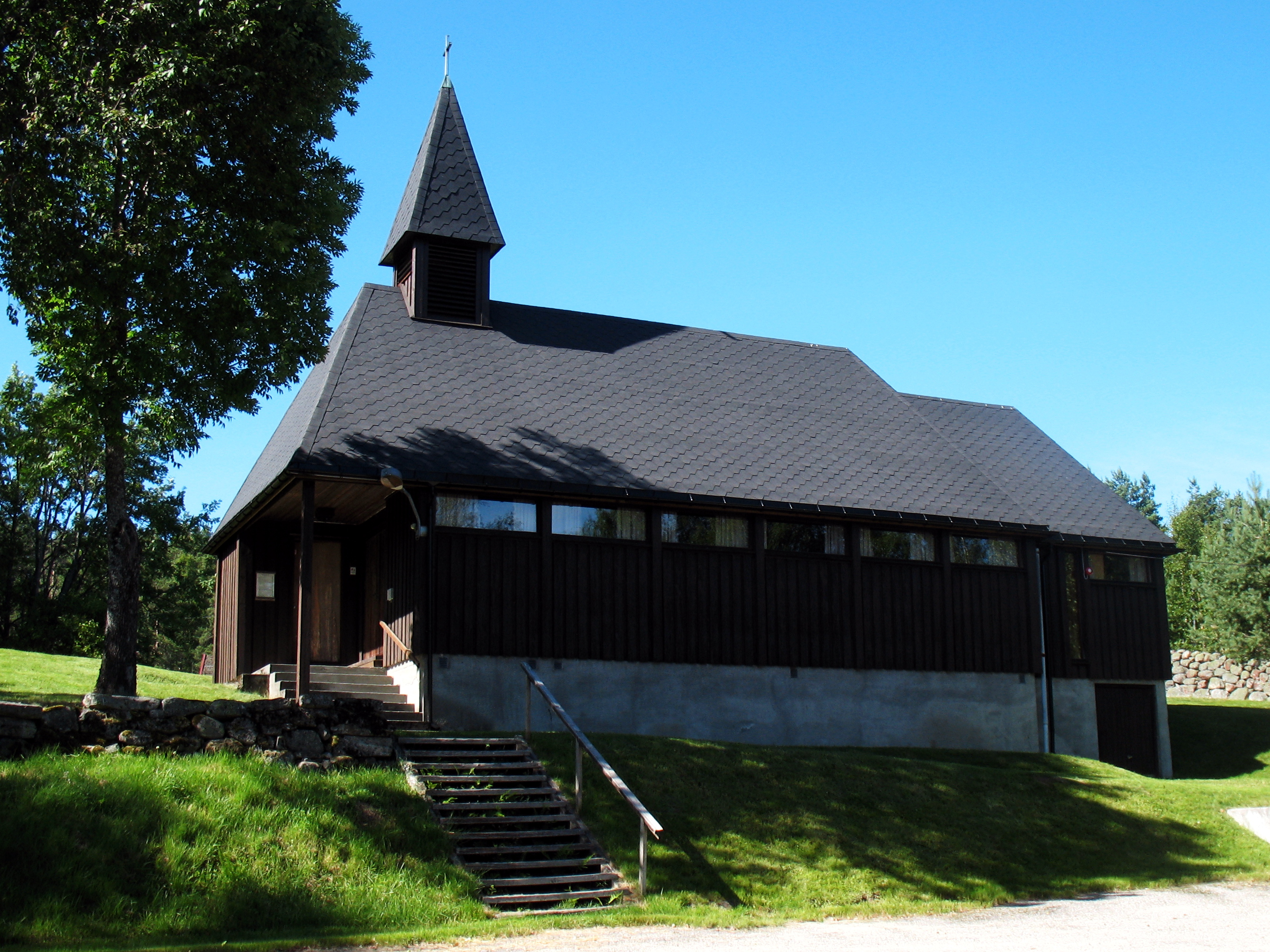 Vegusdal kapell er ei langkyrkje frå 1974 i Birkenes prestegjeld i Birkenes kommune, Aust-Agder. Arkitekt Bjørn Schoder. Kapellet er bygd der kyrkja låg tidlegare.